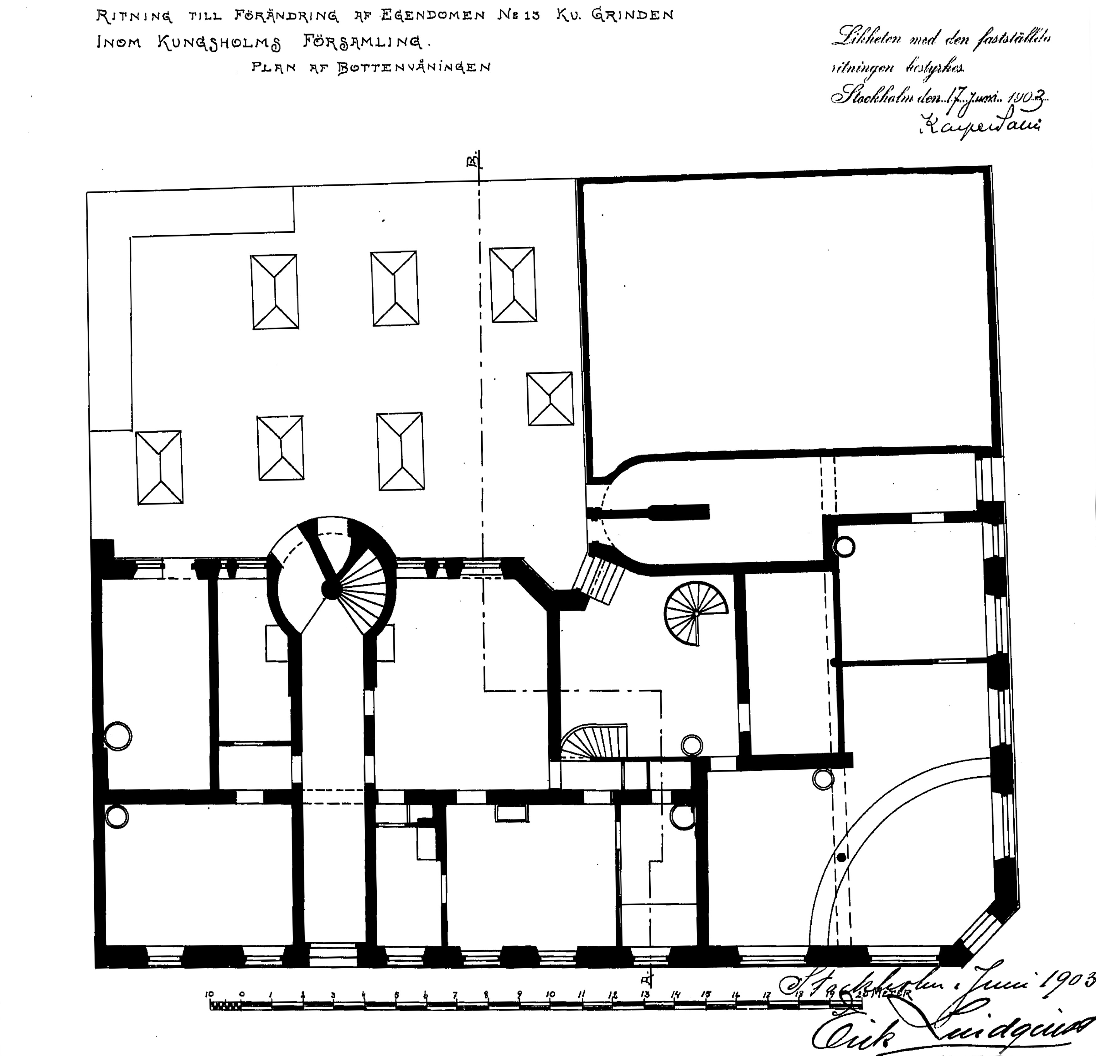 Fastigheten Grinden 13, ombyggnad för apoteket S:t Erik